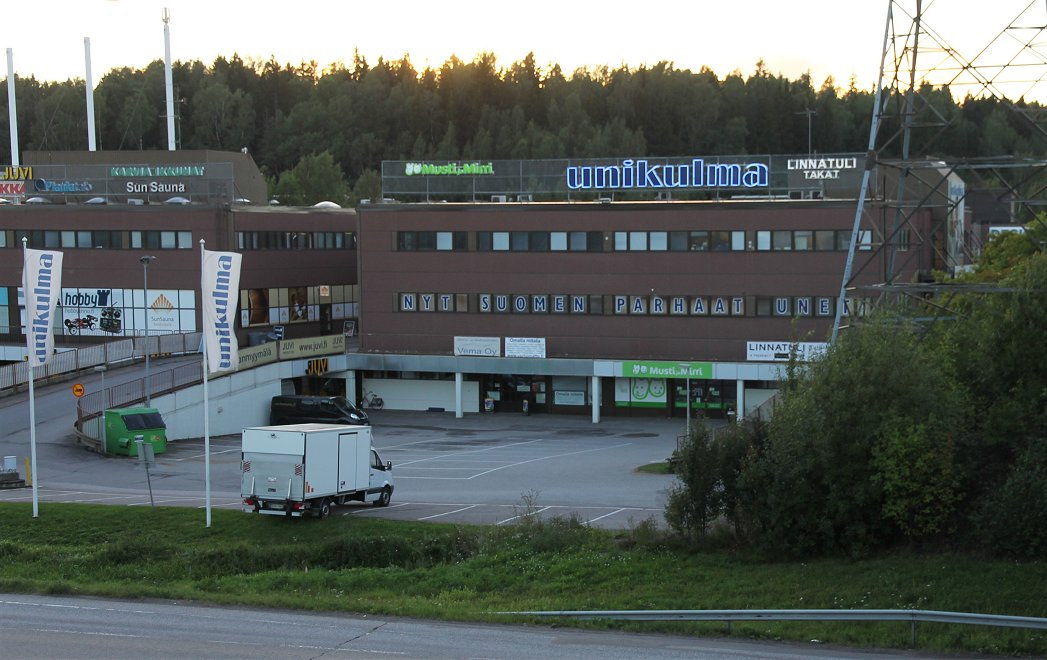 Unikulman Vantaan Petikon toimitilat sijaitsevat Kehä III:n äärellä(Kehä III näkyy kuvan alalaidassa). Unikulma on suomalainen vuonna 1985 perustettu, yksilöllisiä vuoteita ja näihin liittyviä ratkaisuja valmistava ja myyvä perheyritys.